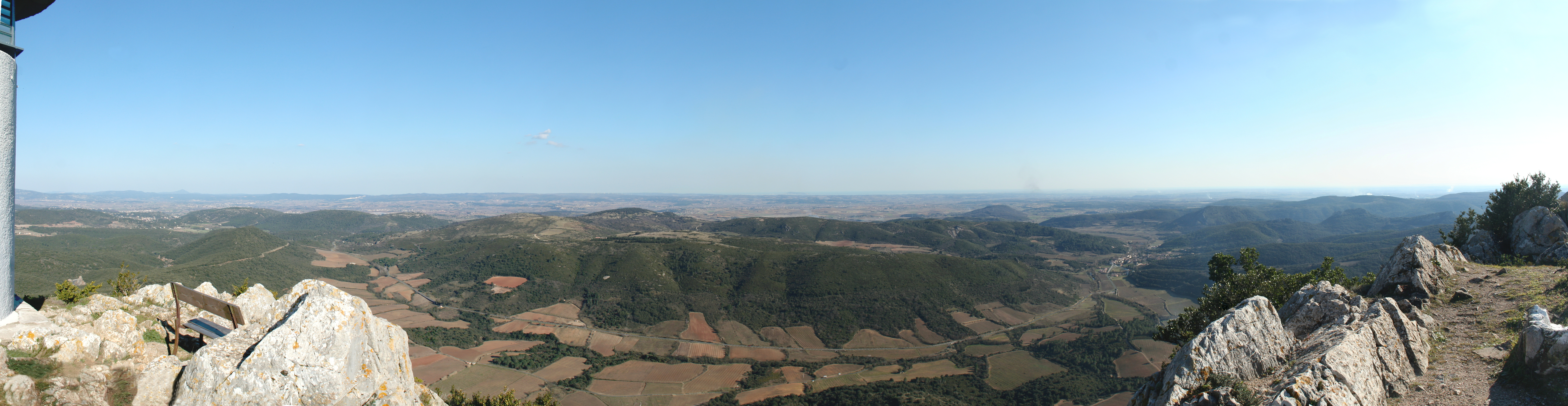 Cabrières (Hérault) - Panorama pris depuis le Pic de Vissou (direction S). Vu sur Cabrières, son château, la plaine de l'Hérault. À l'horizon, de gauche à droite le Pic Saint-Loup, les éoliennes d'Aumelas, Villeveyrac, le Mont Saint-Clair de Sète. À peine visible, le mont Saint-Loup d'Agde. À droite la plaine du Biterrois.